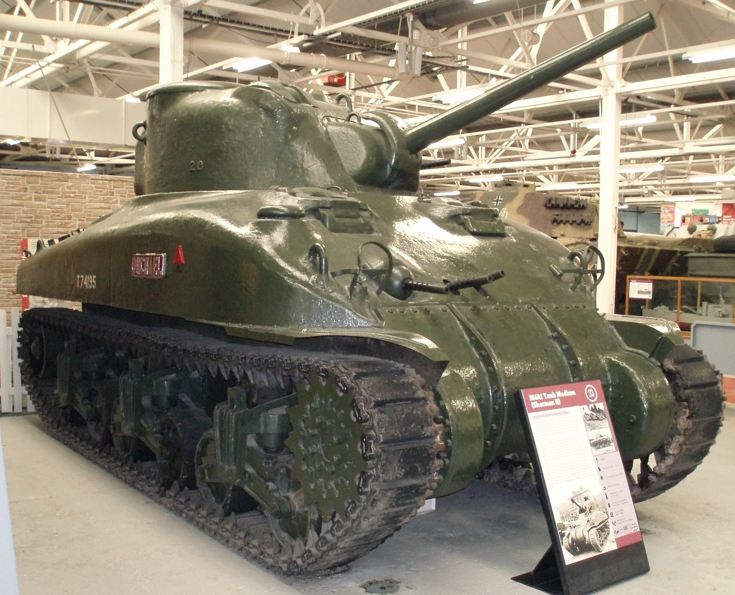 Bovington Tank Museum 276 SHERMAN 2